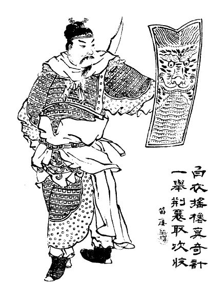 清朝光緒年間，對於在《三國演義》登場的呂蒙，所繪製的想像圖。 Artist's impression of Lu Meng, from a copy of Romance of the Three Kingdoms book released during the Guangxu period.